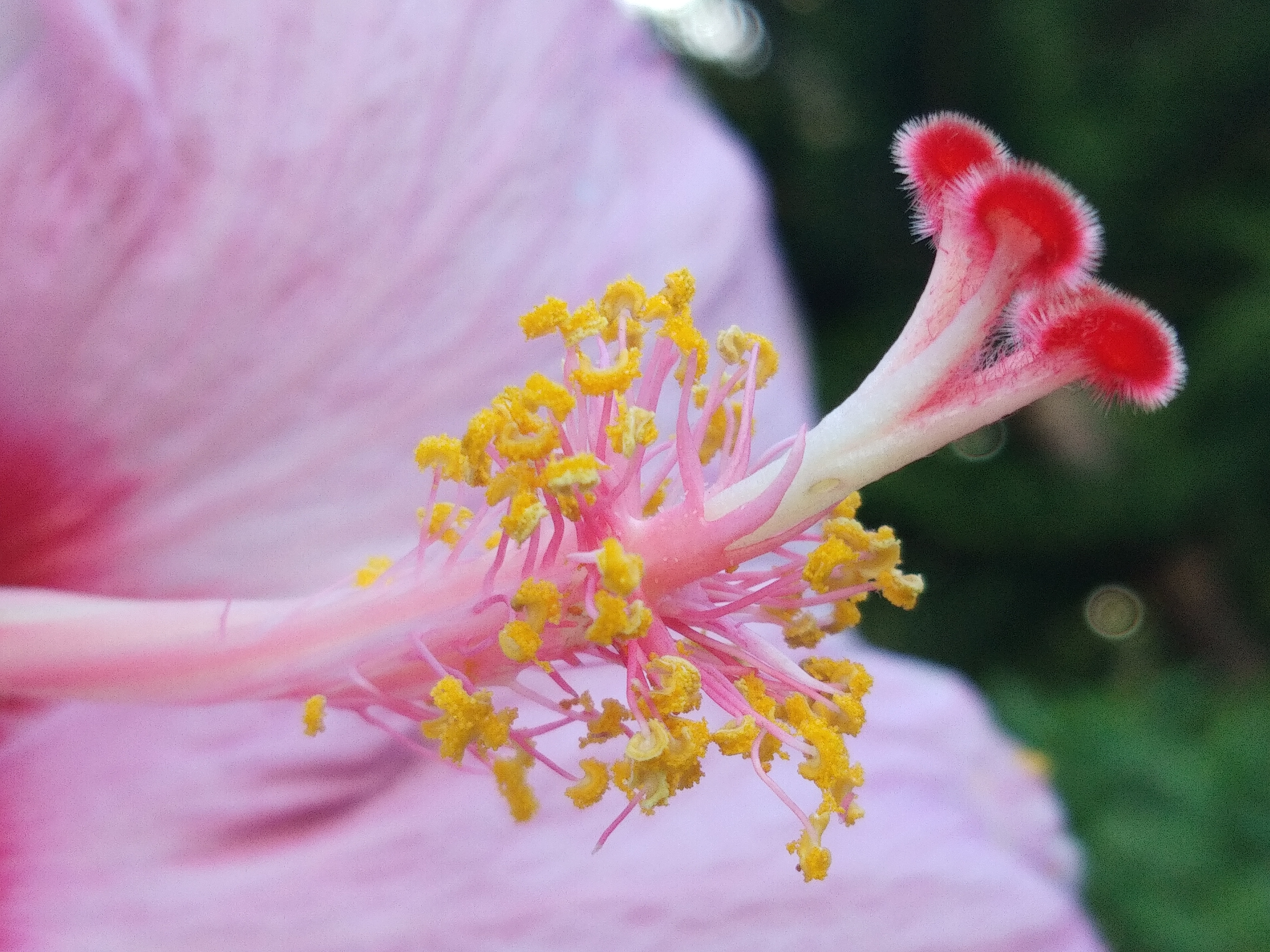 gumamela at hibiscus